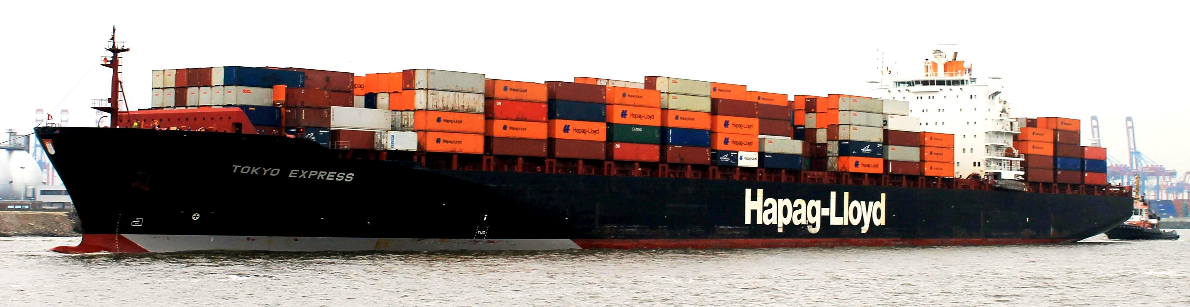 Tokyo Express in Hamburg einlaufend